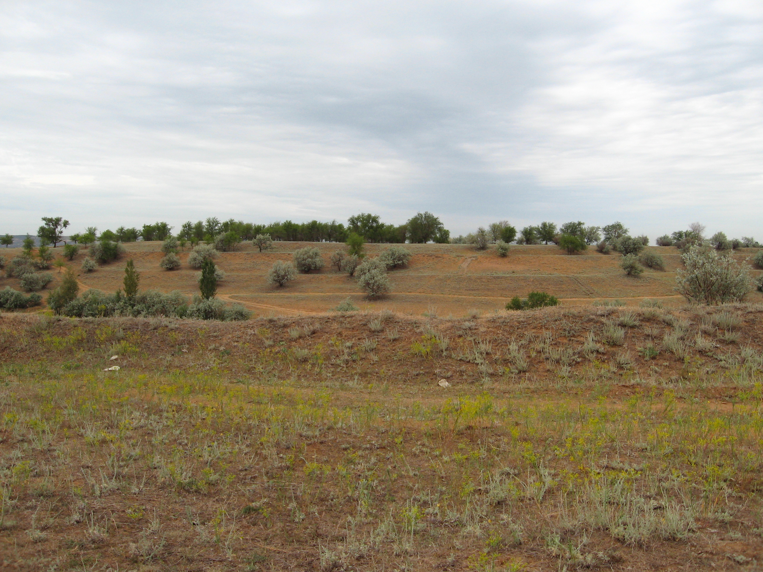 Растительность